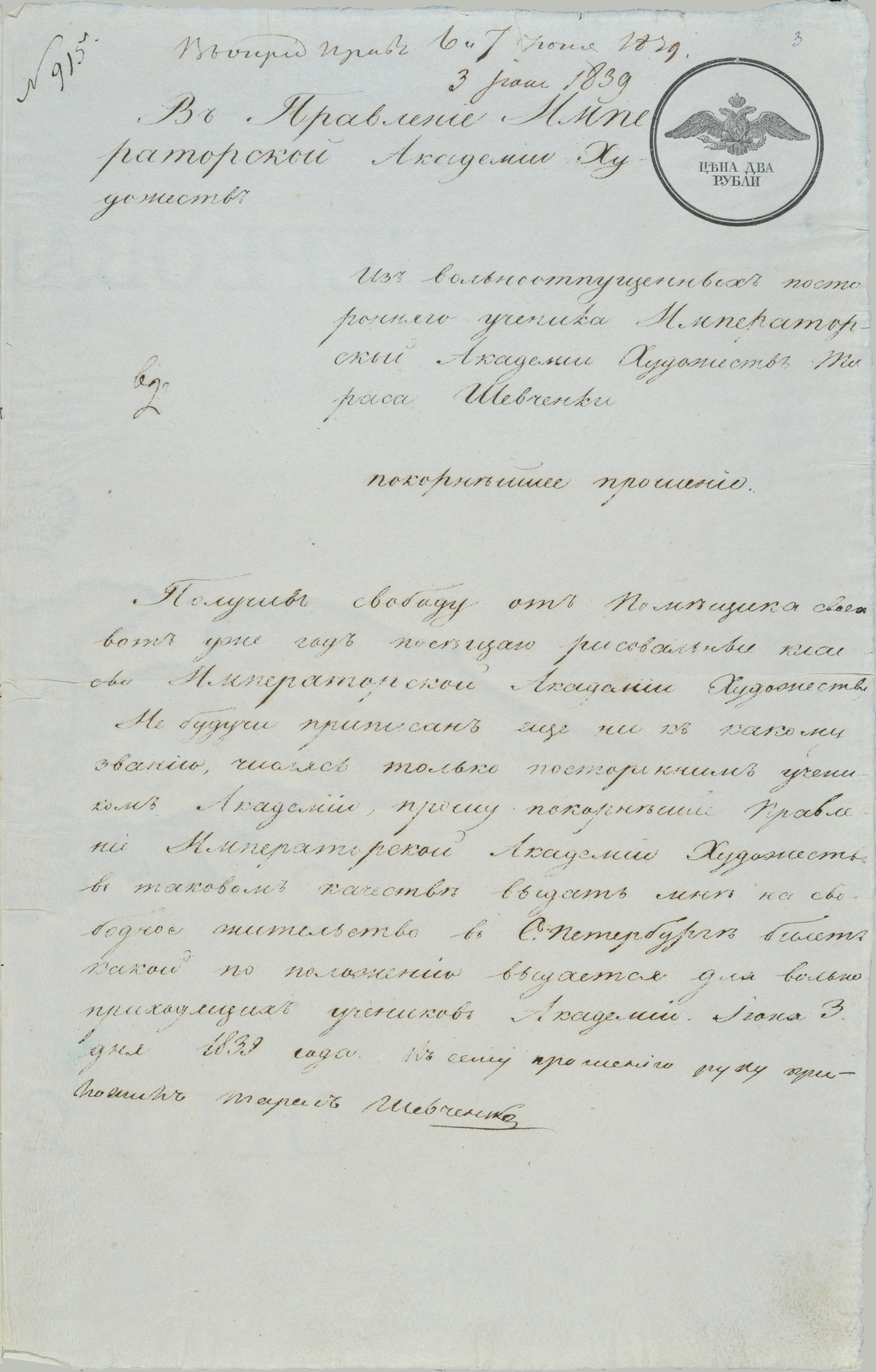 Заява Т. Г. Шевченка до правління Академії мистецтв про видачу квитка на право мешкання в Петербурзіː В Правление императорской Академии художеств Из вольноотпущенных постороннего ученика императорской Академии художеств Тараса Шевченки покорнейшее прошение Получив свободу от помещика своего, вот уже год посещаю рисовальные классы императорской Академии художеств. Не будучи приписан еще ни к какому званию, числясь только посторонним учеником Академии, прошу покорнейше Правление императорской Академии художеств в таковом качестве выдать мне на свободное жительство в С.-Петербурге билет, какой по положению выдается для вольноприходящих учеников Академии. Июня 3 дня, 1839 года. К сему прошению руку приложил Тарас Шевченко = Оригінал написаний рукою писаря, лише підпис рукою Т. Шевченка: «К сему прошению руку приложил Тарас Шевченко».